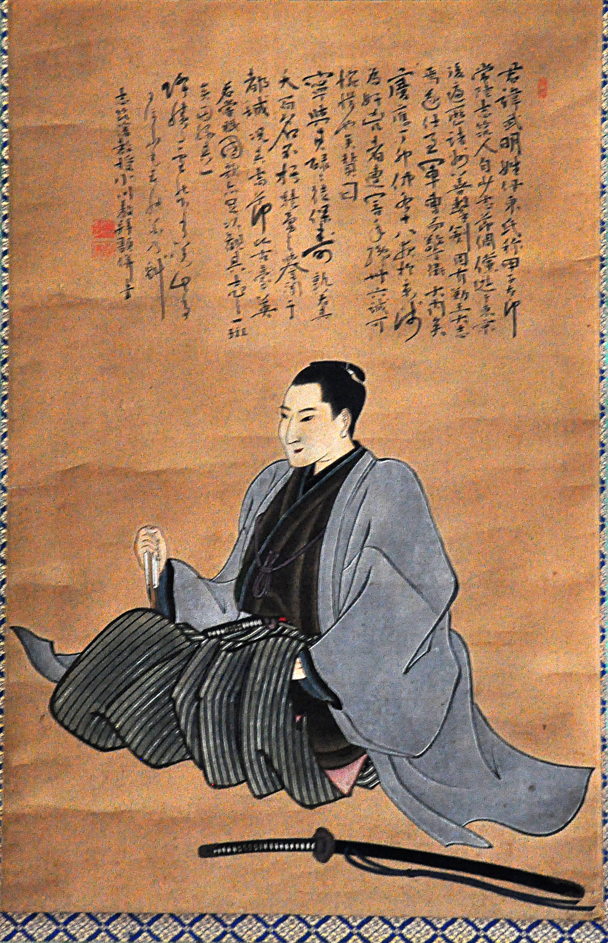 伊東甲子太郎肖像画 mizukusa kasumigaura 蔵